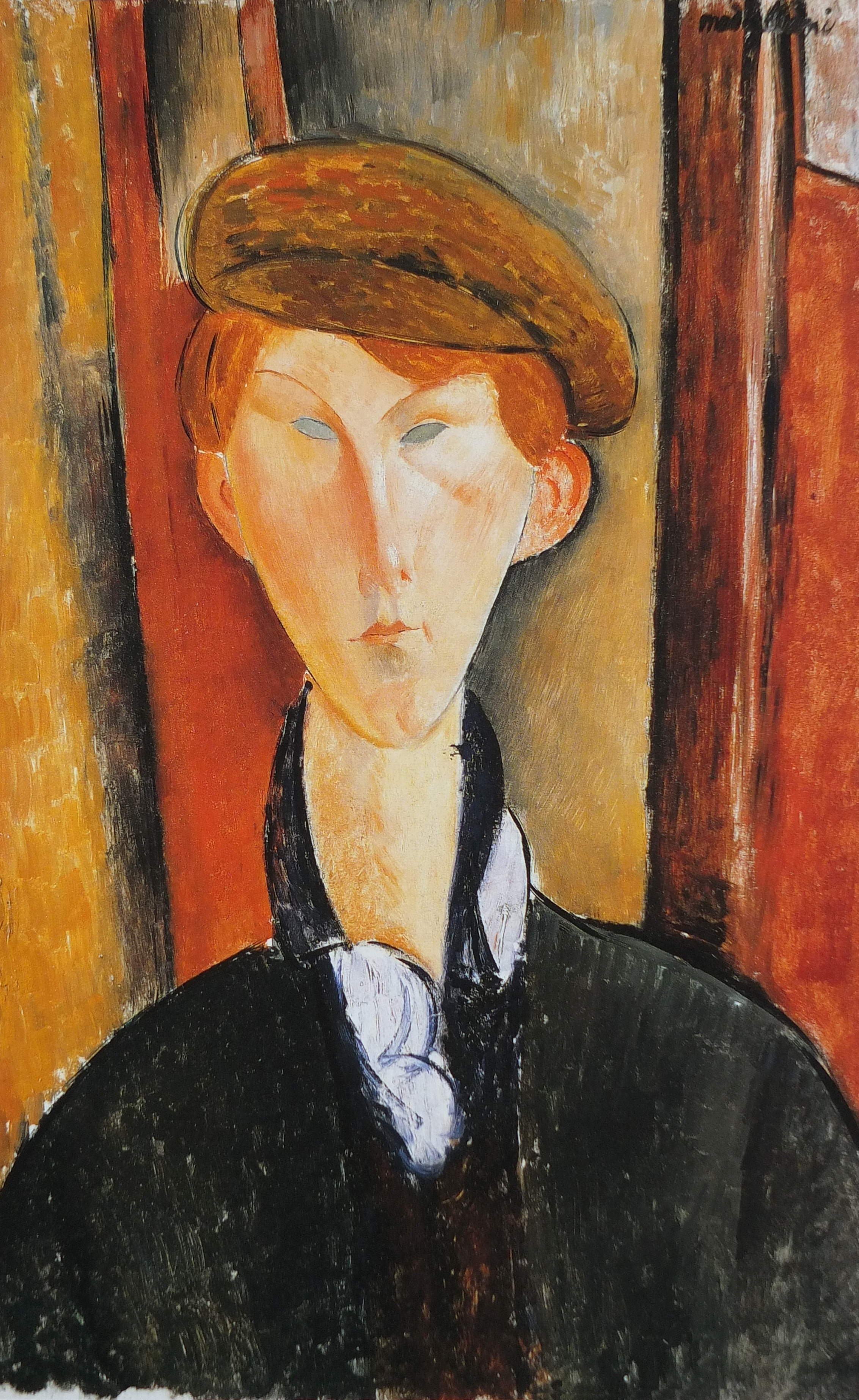 Jeune homme à la casquette, huile sur toile d'Amédéo Modigliani, 1919, 61 x 37,8 cm, The Detroit Institute of Art, Leg Robert H. Tannahill.